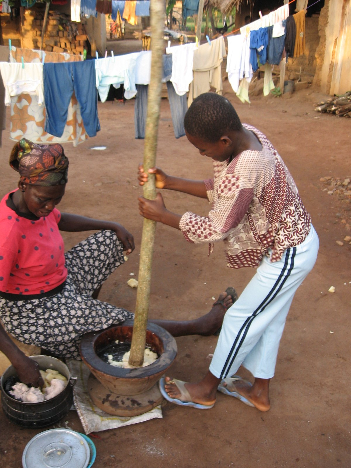 Pounding Fufu in Ghana